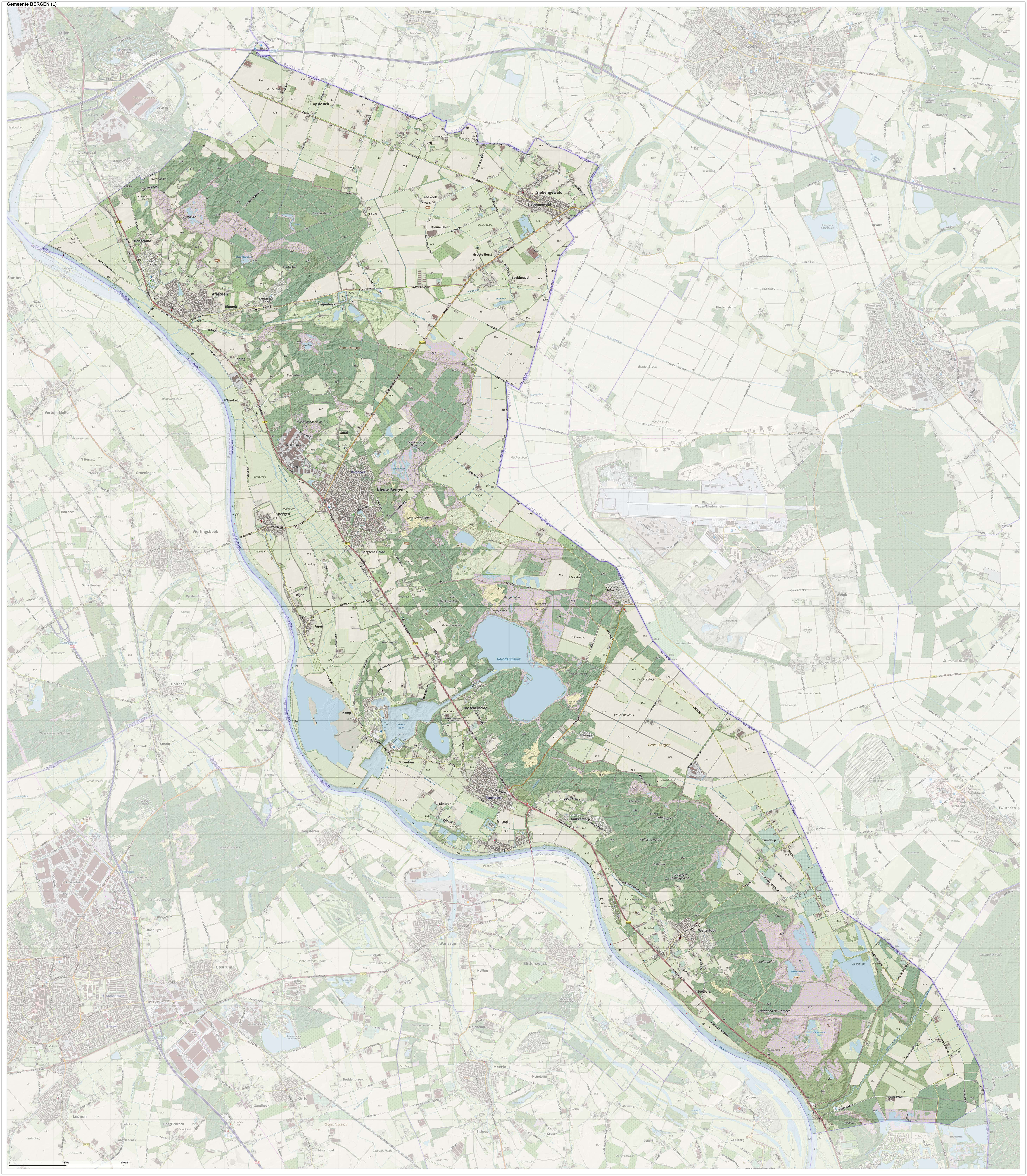 Topografische gemeentekaart. Resolutie: 400 pixels/km. Kaartbeeld samengesteld uit de open geodata van de Top10NL en Top25namen (Kadaster), Creative Commons-BY licentie. Gebouwvlakken uit open geodata BAG extract. Wegen uit de OpenStreetMap, OpenStreetMap community. Reliëfschaduw uit de Actuele Hoogtekaart AHN2. Samenstelling en kleurenschema: Jan-Willem van Aalst, met QGIS. Zie ook de Legenda.